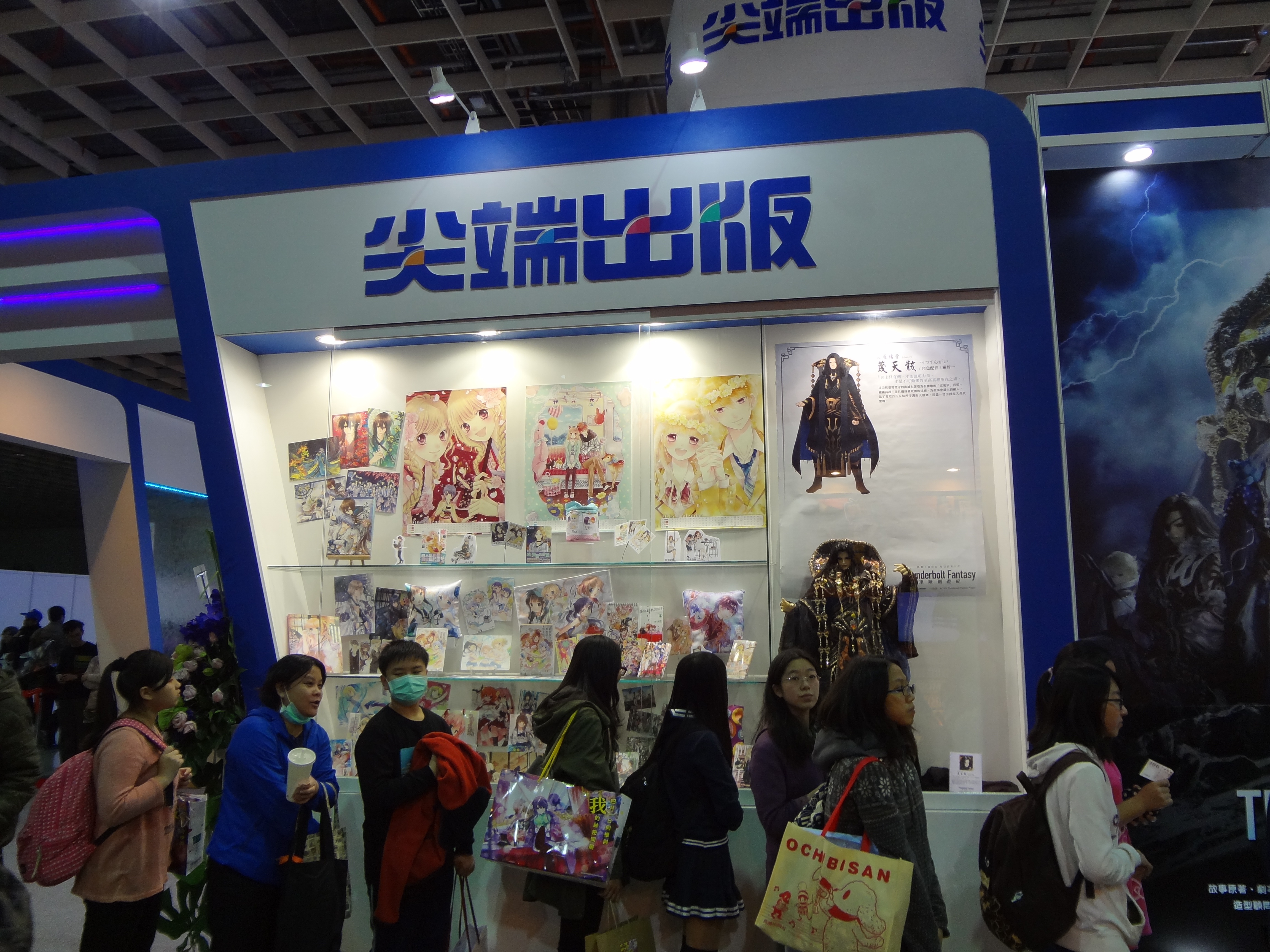 2016年第四屆台北國際動漫節，尖端出版攤位精品展示窗。